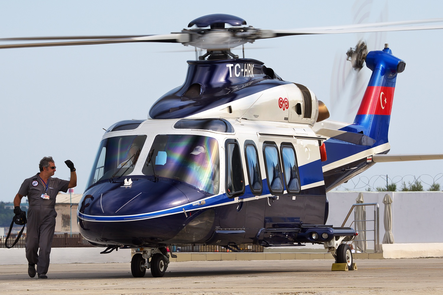 TC-HRK (cn 31087)